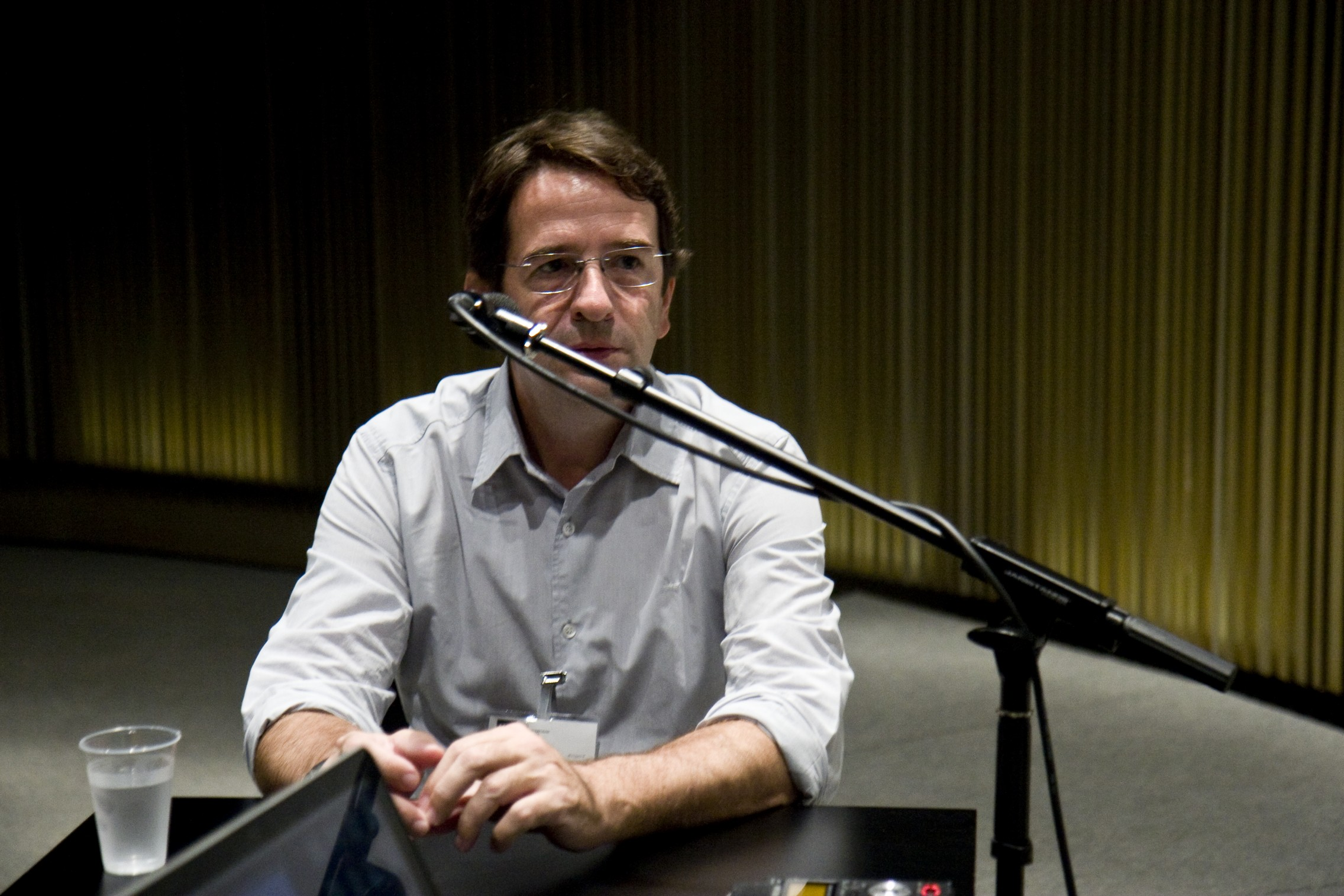 Ignasi Aballí al MACBA